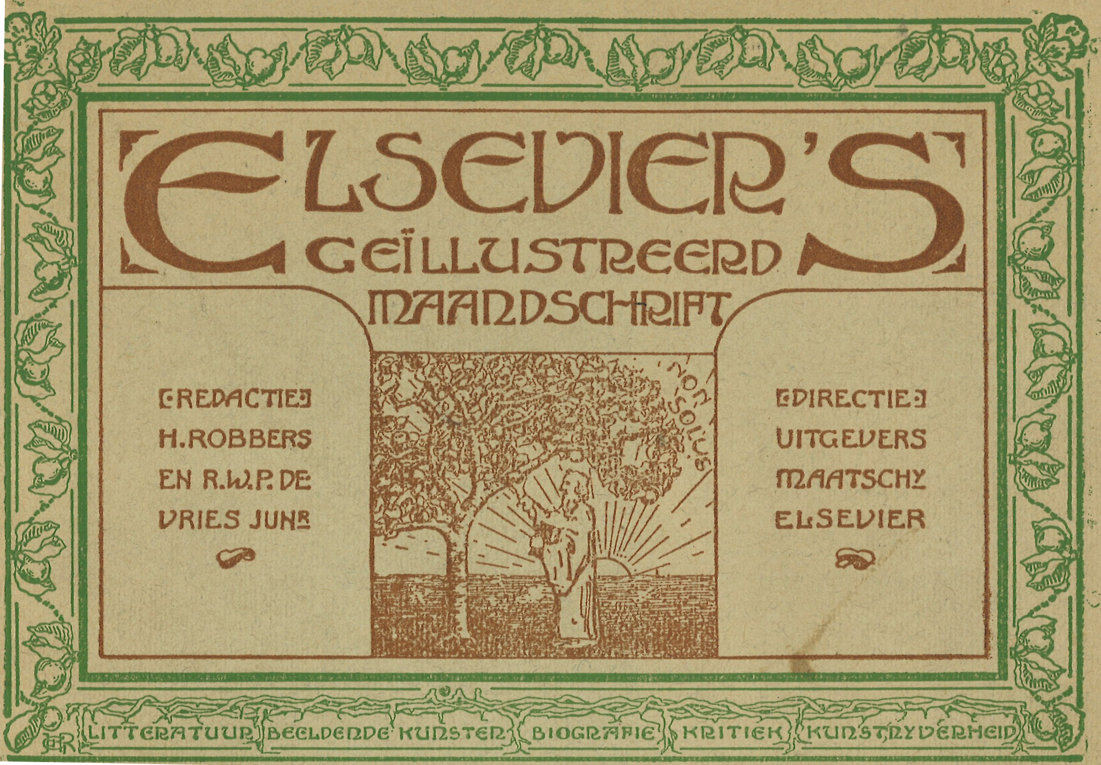 Omslag Elsevier's Geïllustreerd Maandschrift. Drukwerk. Height: 22 cm (8.6 in); Width: 30 cm (11.8 in) dimensions QS:P2048,22U174728;P2049,30U174728. Roermond, collectie Beeldende Kunst gemeente Roermond. Tekst: Elsevier's Geïllustreerd Maandschrift Redactie H. Robbers en R.W.P. de Vries junr. Directie Uitgevers Maatschy Elsevier Litteratuur Beeldende kunsten Biografie Kritiek Kunstnijverheid Afbeelding van een man met baard die appels uit een boom plukt bij zonsopgang (?). "Non solus". Signatuur linksonder: monogram Ja[?]CR